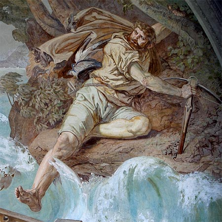 Fresko "Tells Sprung" in der Tellskapelle (Nr. 03.1-8814) Ernst Stückelberg (1831–1903) Alternative namesJohann Melchior Ernst StickelbergerDescription Swiss painter Date of birth/death21 February 183114 September 1903Location of birth/deathBaselidemWork locationBern, Antwerp, Munich, Rome, Zurich, Basel, Sisikon UR (Urnersee)Authority control VIAF: 74648745 LCCN: nr95005764 GND: 118756206 ULAN: 500009186 ISNI: 0000 0001 1071 1613 WorldCat